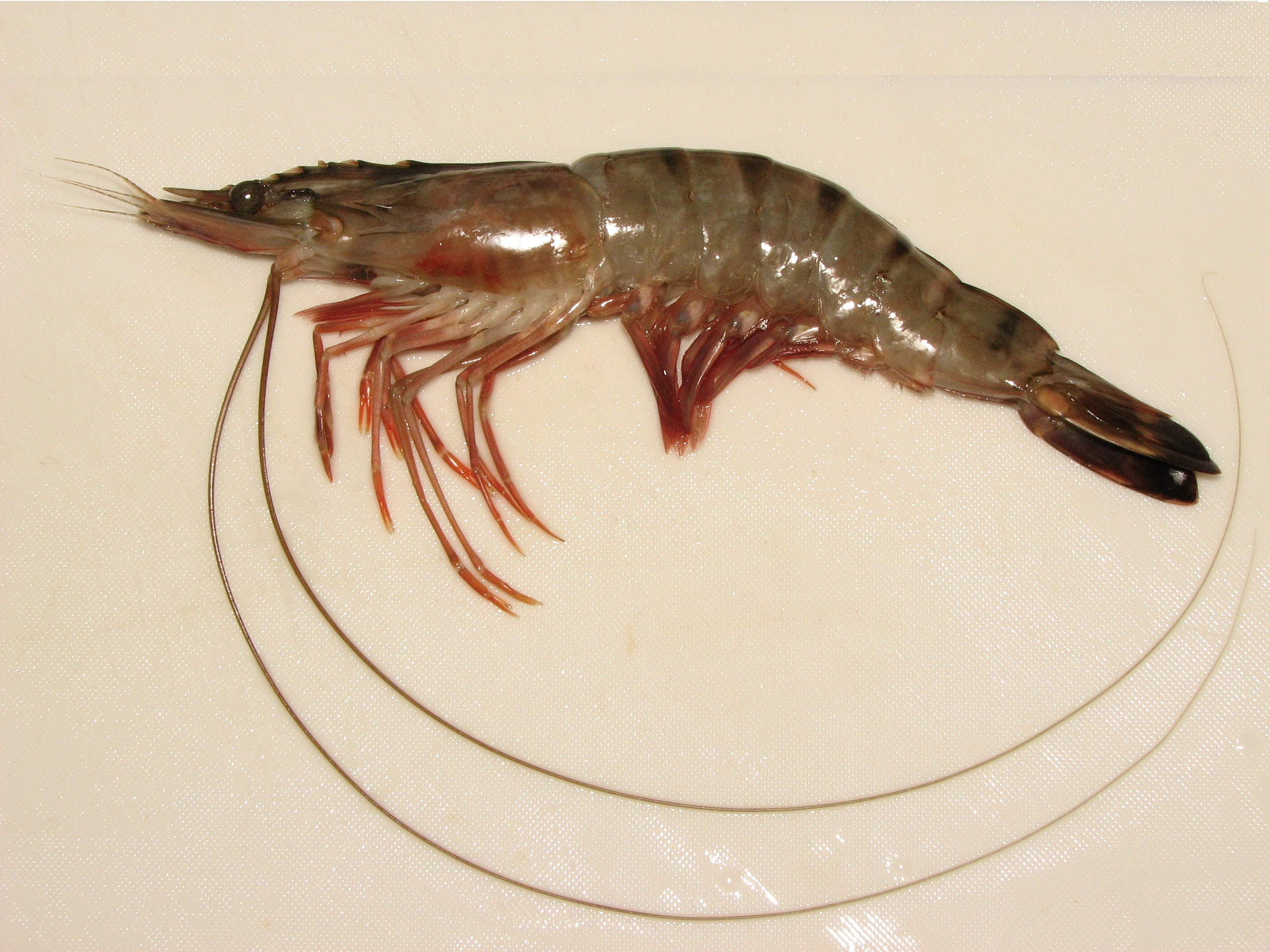 Penaeus monodon(ウシエビ・ブラックタイガー)・フィリピン産・養殖